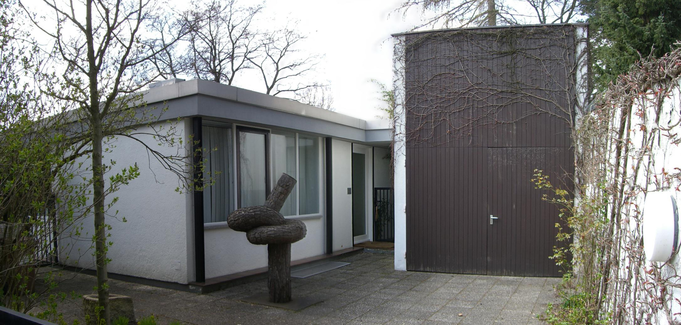 München: Wohnhaus Maurer (Straßenseite)